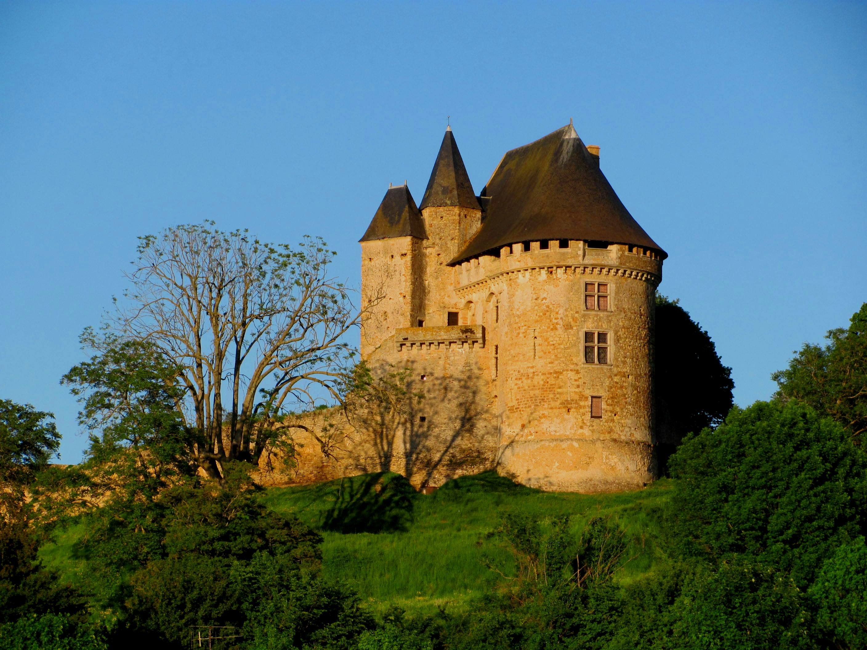 ballon